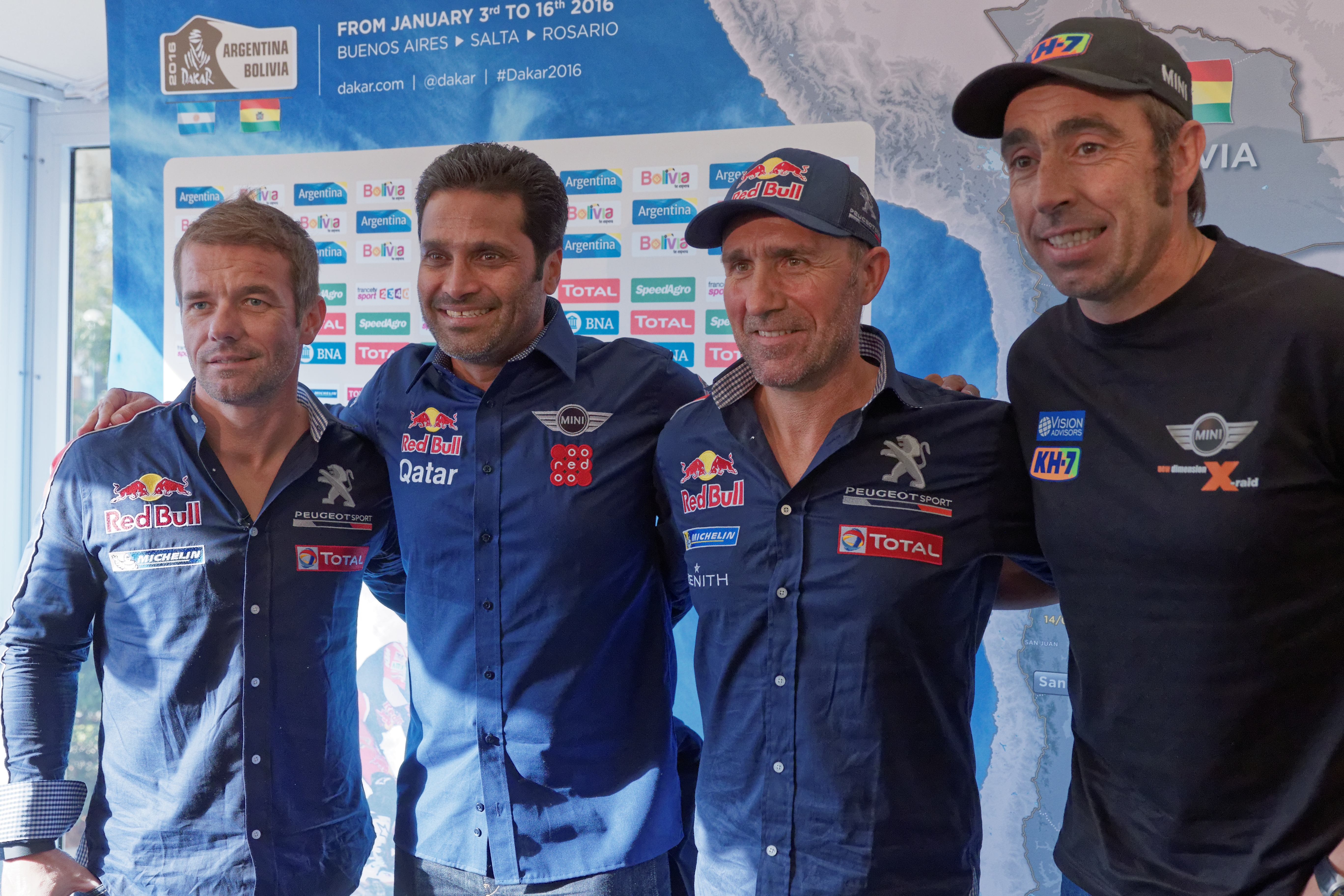 Conférence de presse du Dakar 2016.